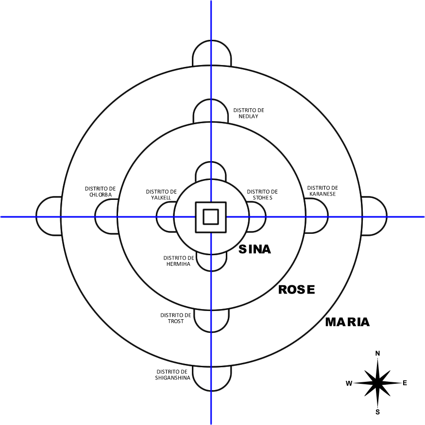 Esquema de como se organizam as muralhas - Shingeki no Kyojin